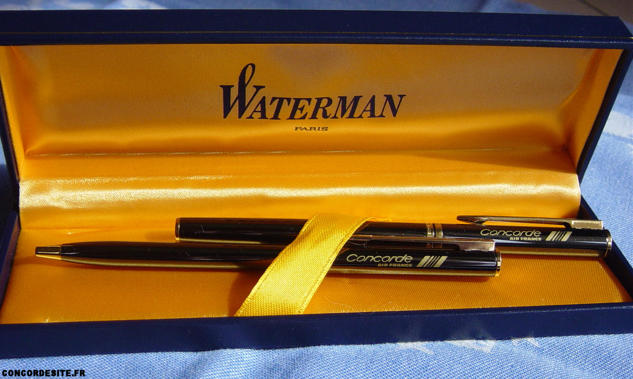 Parure Waterman avec deux stylos signés Concorde (US) CONCORDE signed Waterman pen